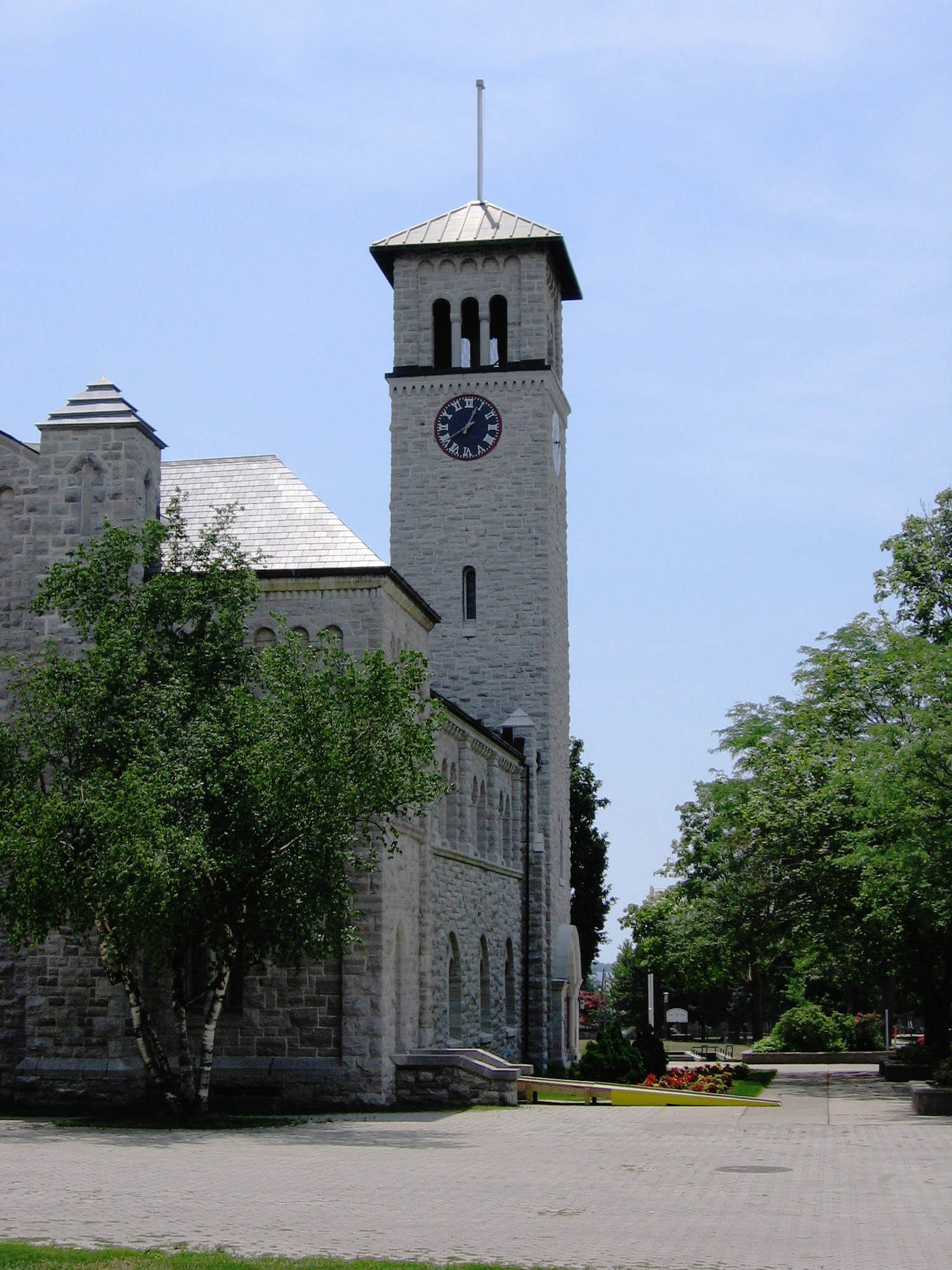 この写真は英語版Wikipediaから来ています。